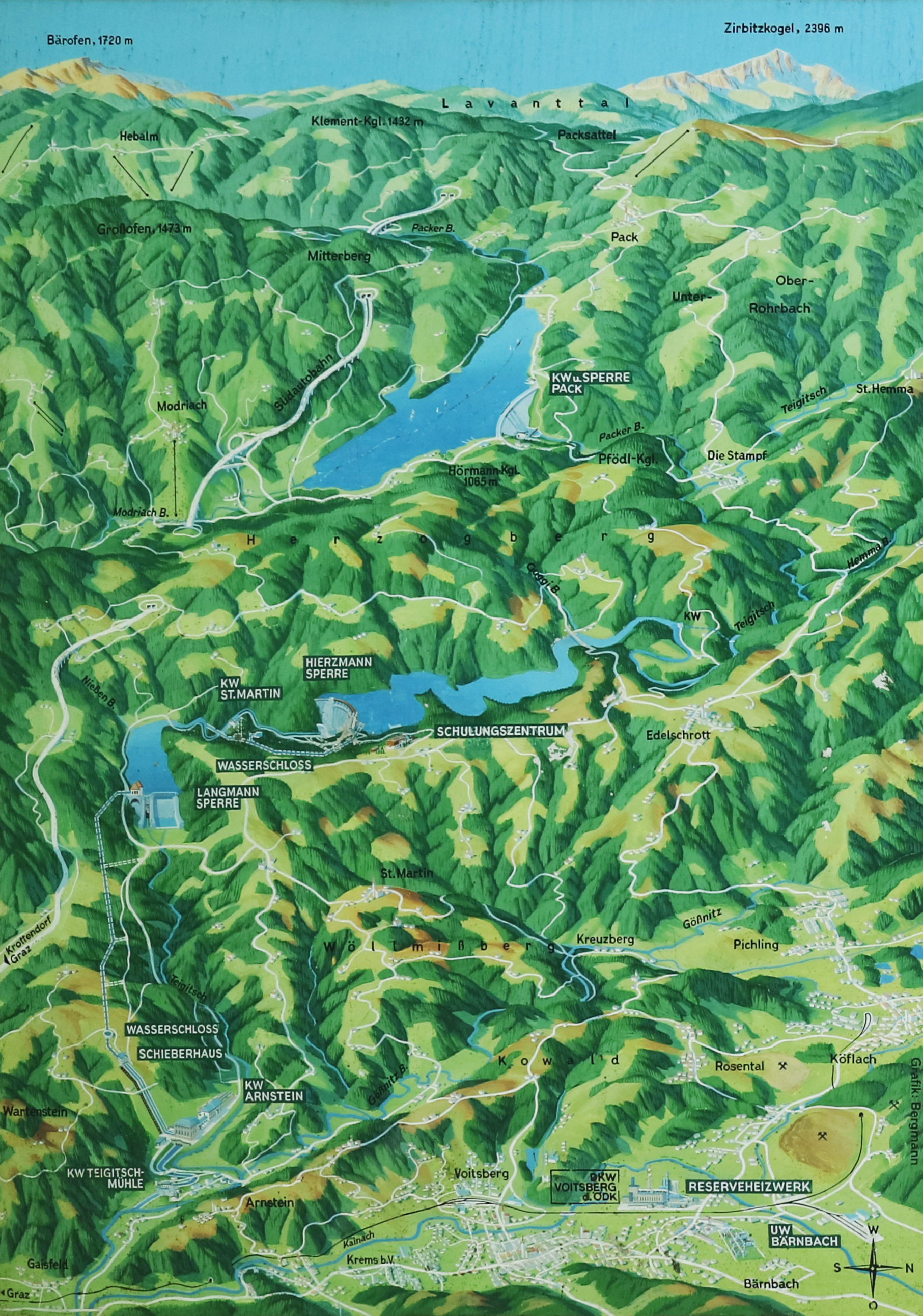 Übersicht der Kraftwerksgruppe Teigitsch, bestehend aus drei Stauseen und vier Kraftwerken